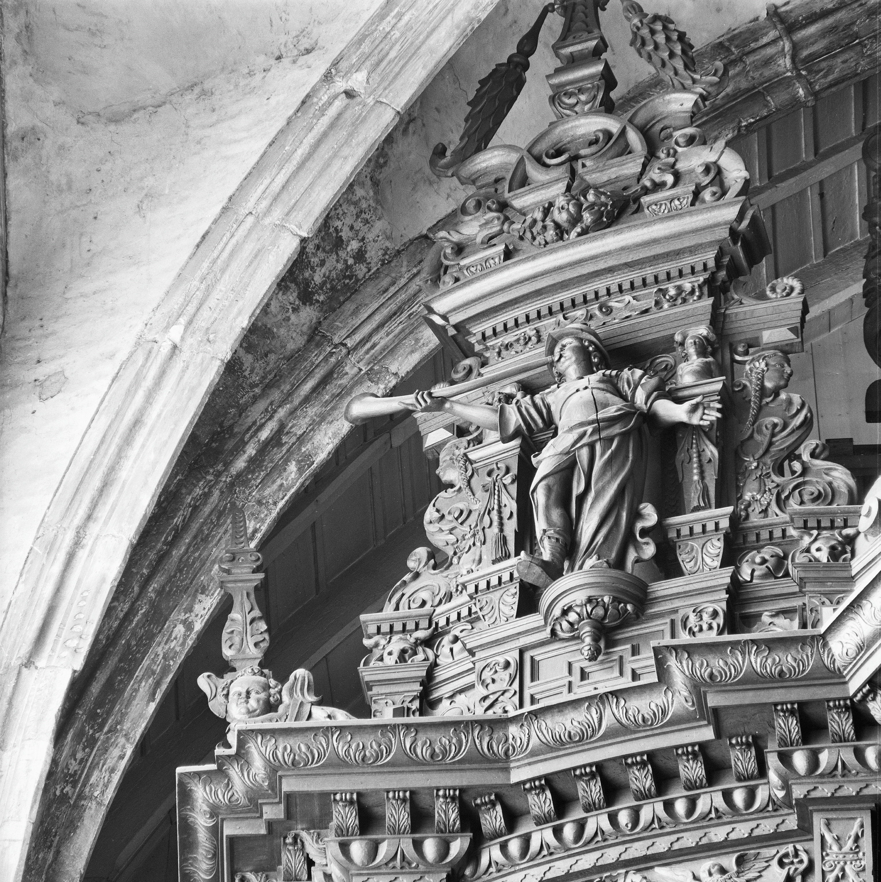 Sint Janskathedraal: INTERIEUR, ORGEL, DETAIL VAN BEKRONING